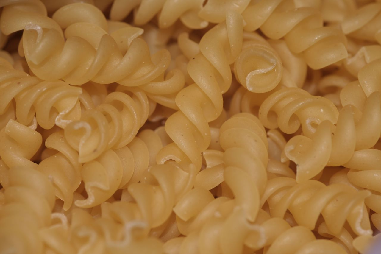 Cooked fusilli pasta